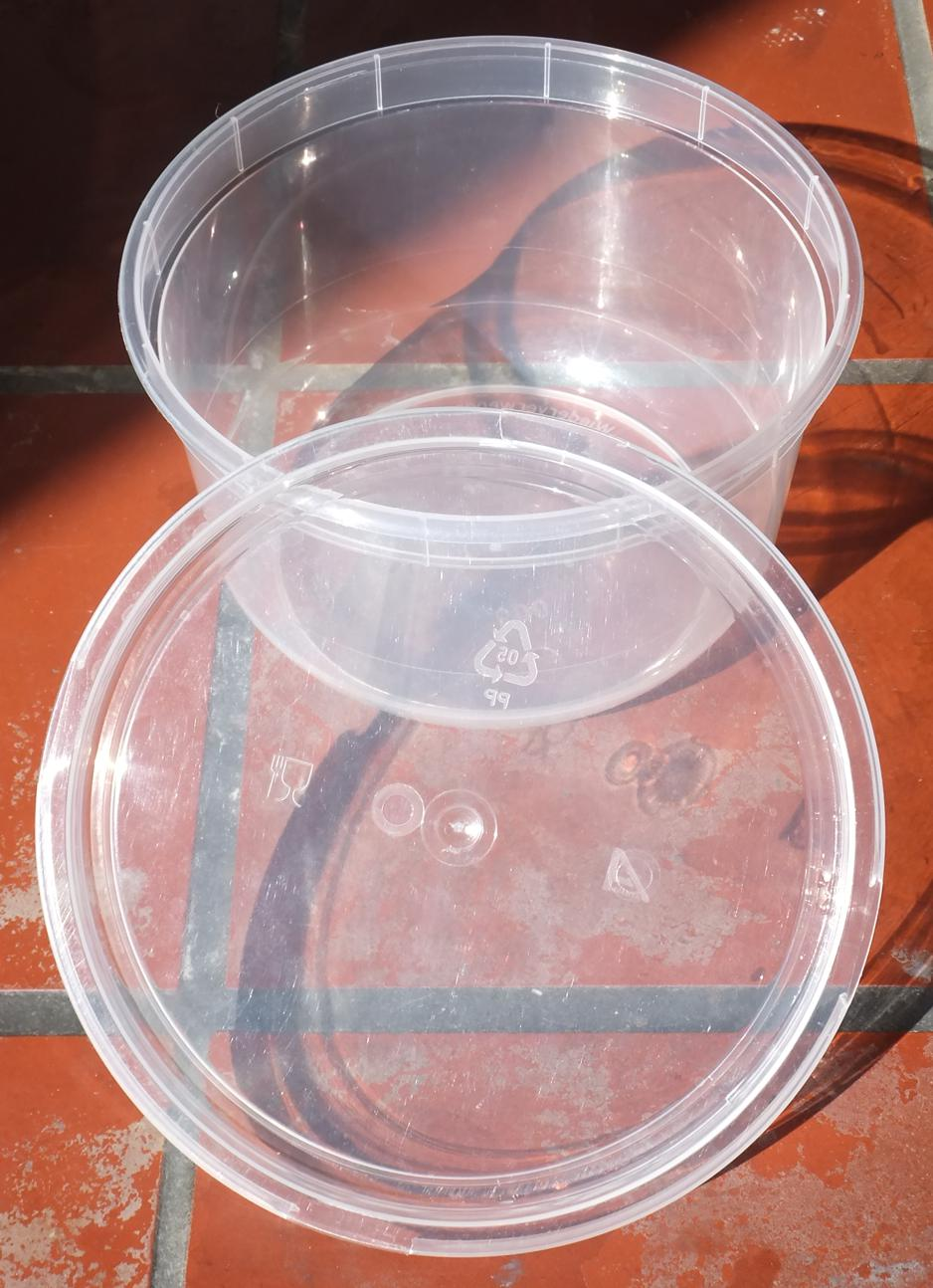 Behälter aus transparantem PP